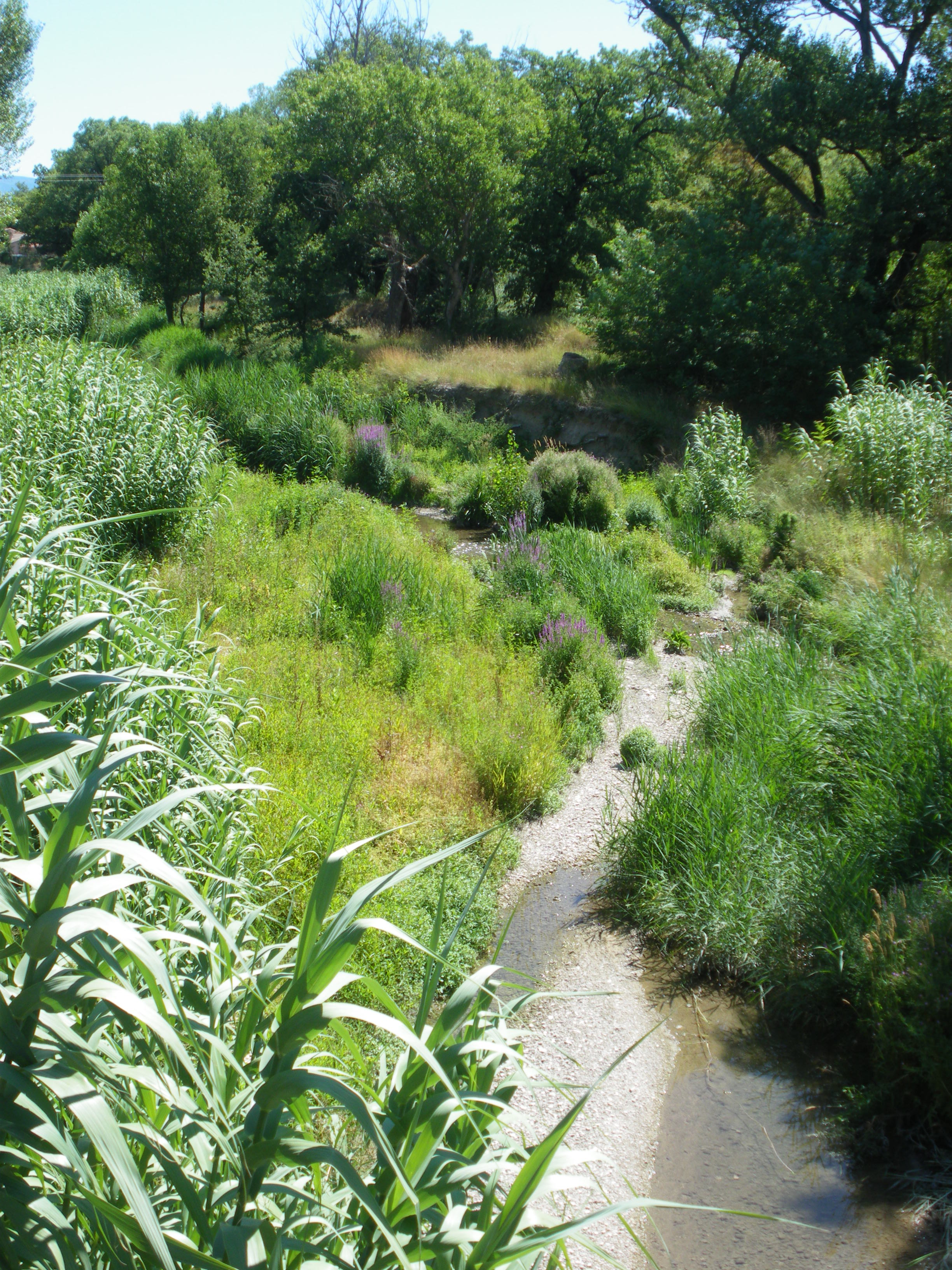 La Mède, Rivière du Vaucluse, France